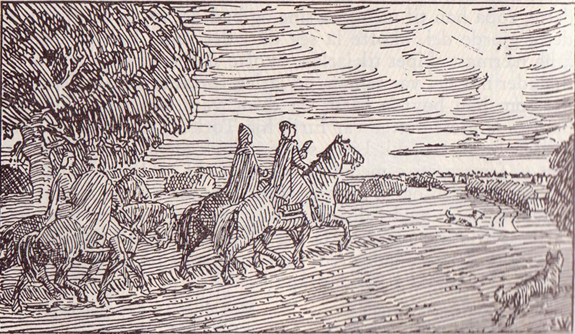 Olav Tryggvason